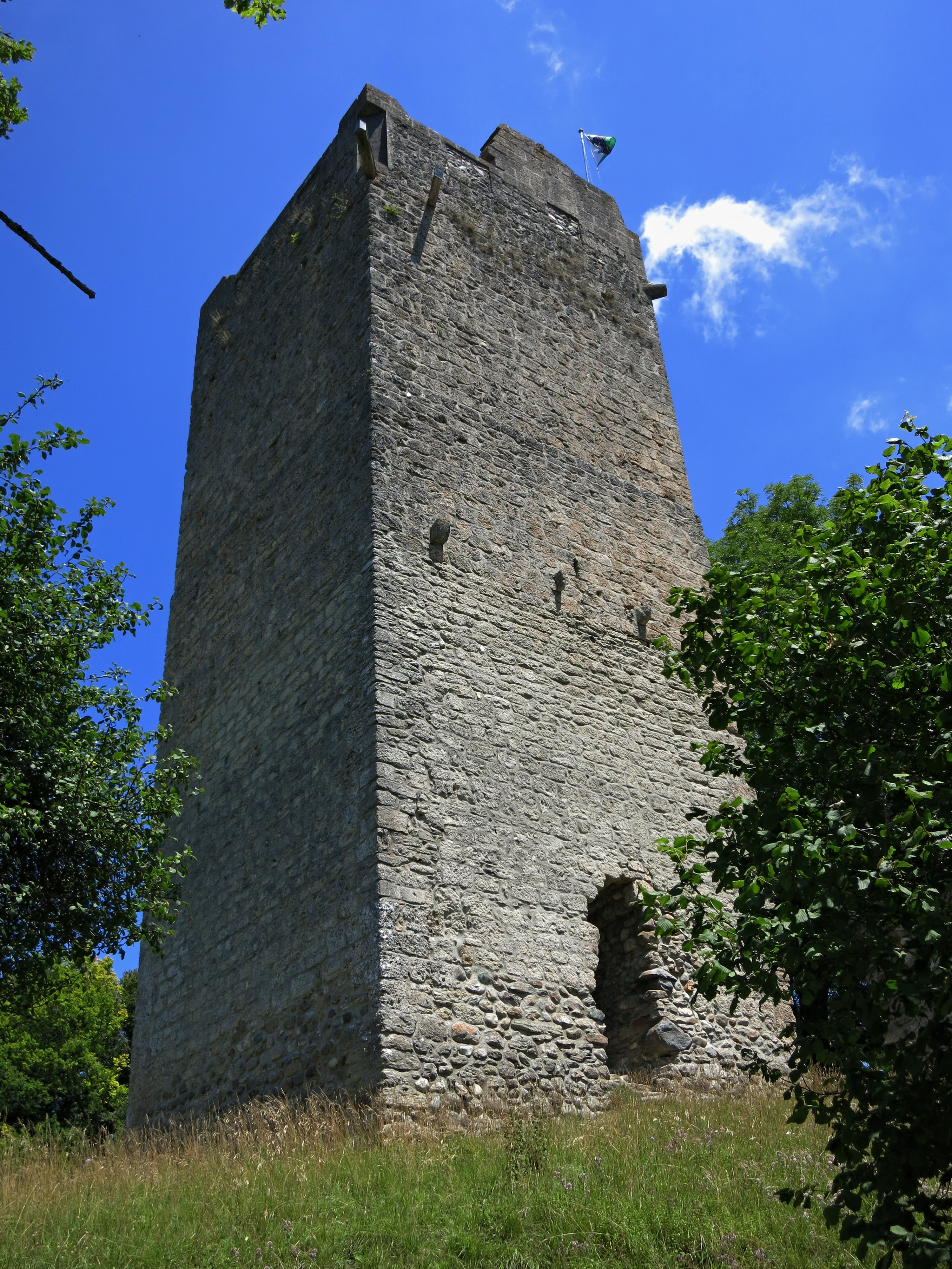 Tour de Saint-Martin